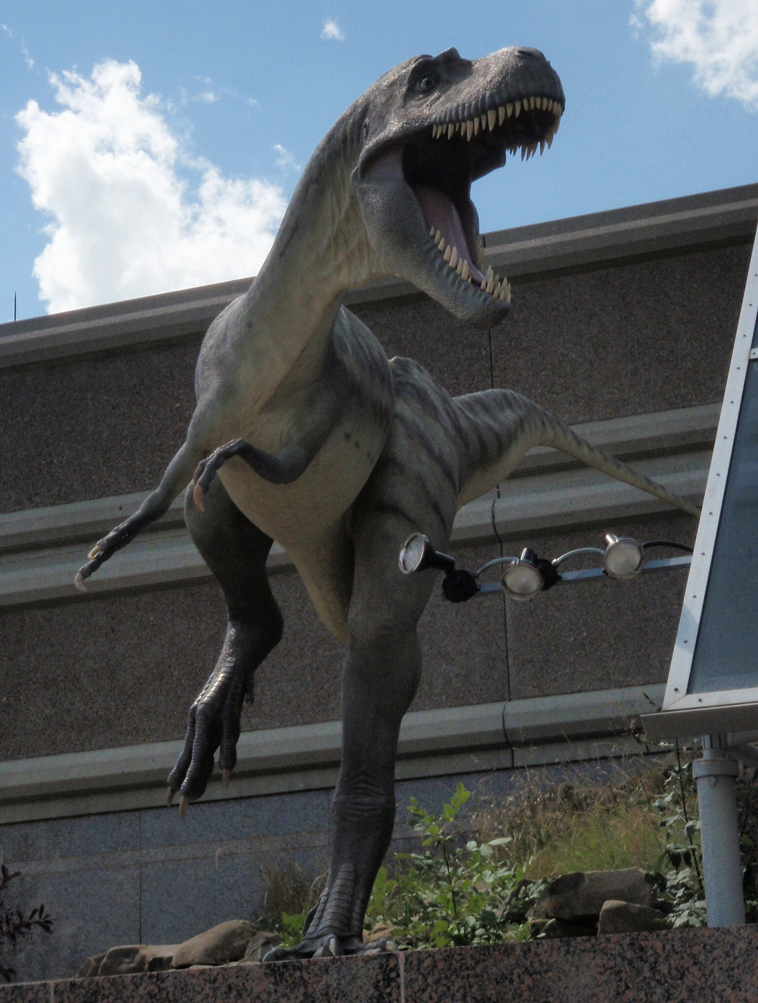 Drumheller dinosaurs